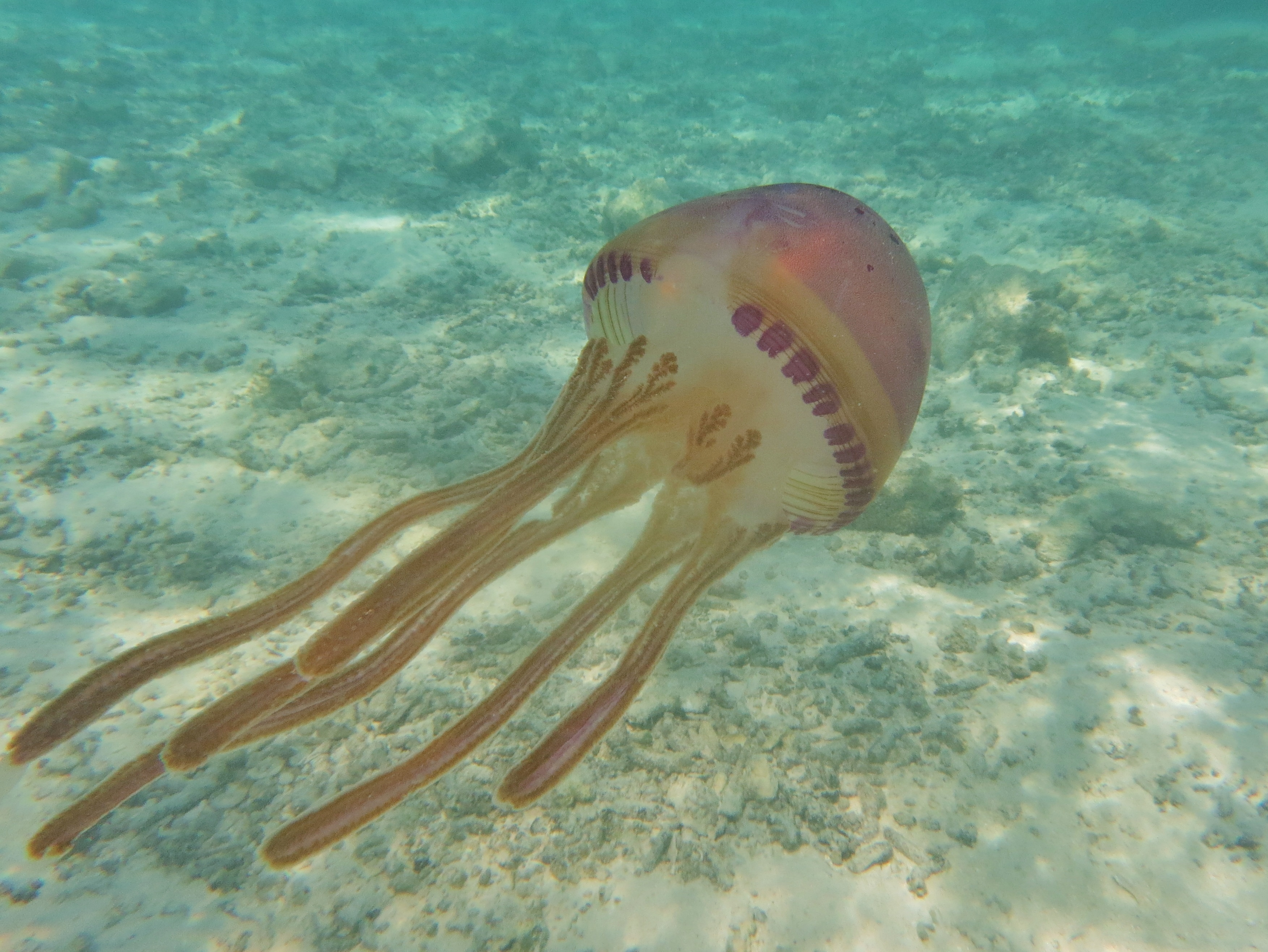 Une méduse Thysanostoma loriferum aux maldives (atoll de Baa).